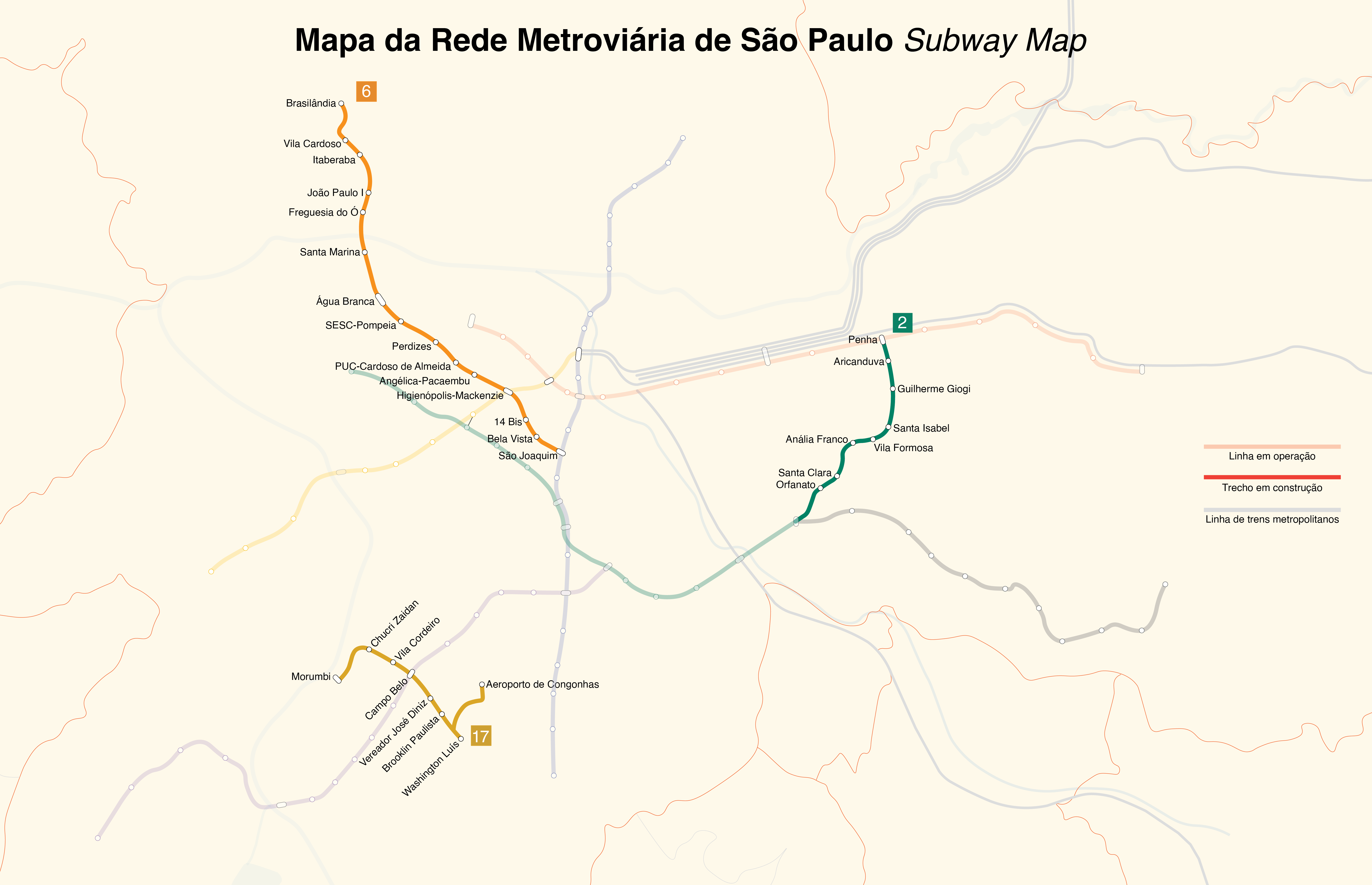 Mapa das obras do Metrô de São Paulo em maio de 2018.